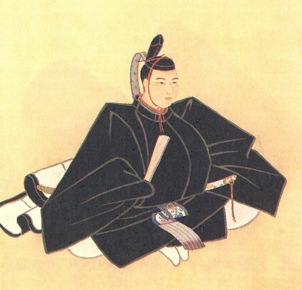 伊達斉村の肖像。